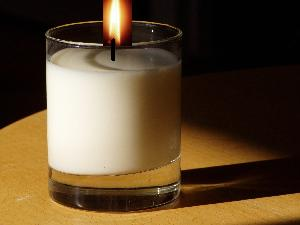 melig melkkaarstje voor in de kroeg ;-) Bron: Glas halfvolle melk. Opname Amarant. Beschikbaar gesteld onder de GNU/FDL. Auteurs: Gebruiker:GerardM, Gebruiker:Flyingbird